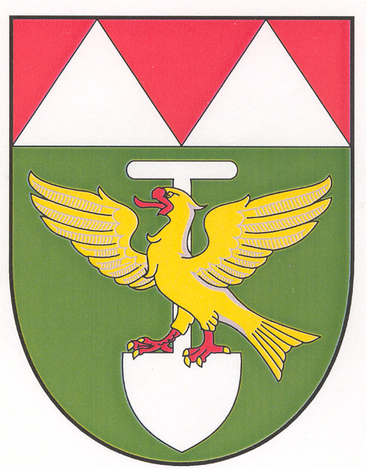 Jedná se o znak obce Rájec. V horní části štítu jsou na červeném podkladě dva bílé trojúhelníky. Ve spodní části je nazeleném podkladě bílý rýč, na kterém stojí žlutý dravý pták (Luňák) s roztaženými křídly.